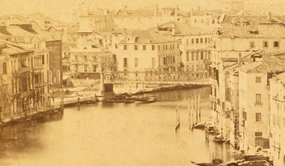 Carlo Naya, "Panorama di Venezia preso dalla Chiesa della Salute" detaglio.